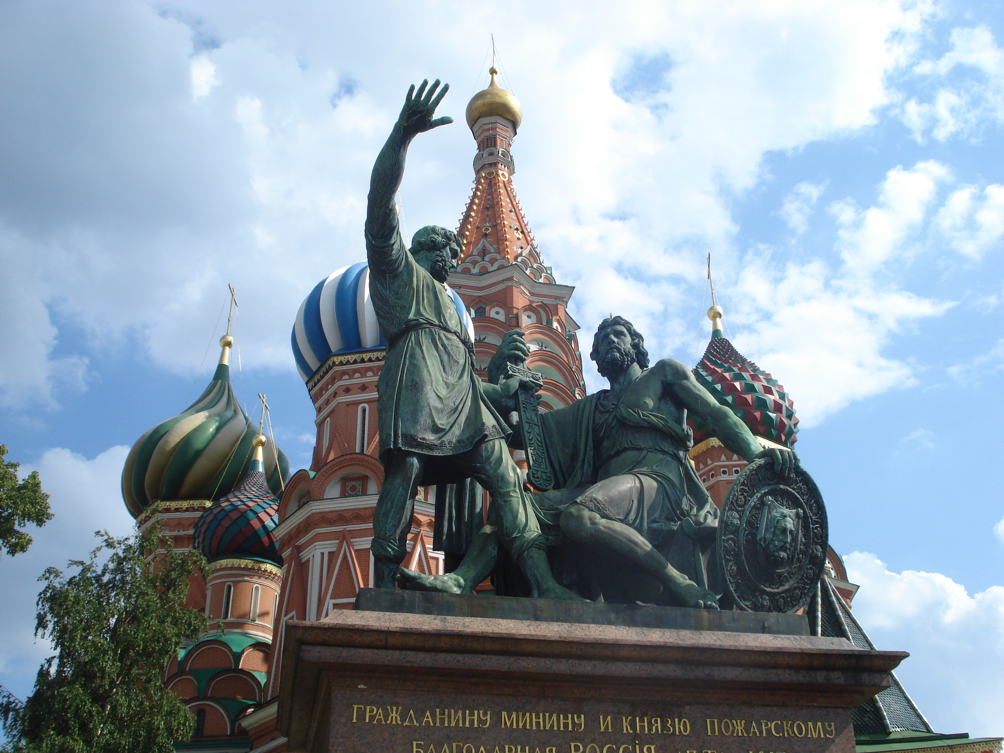 Споменик на Црвеном тргу у Москви. 31. јул 2009. Снимио: Јакша П.